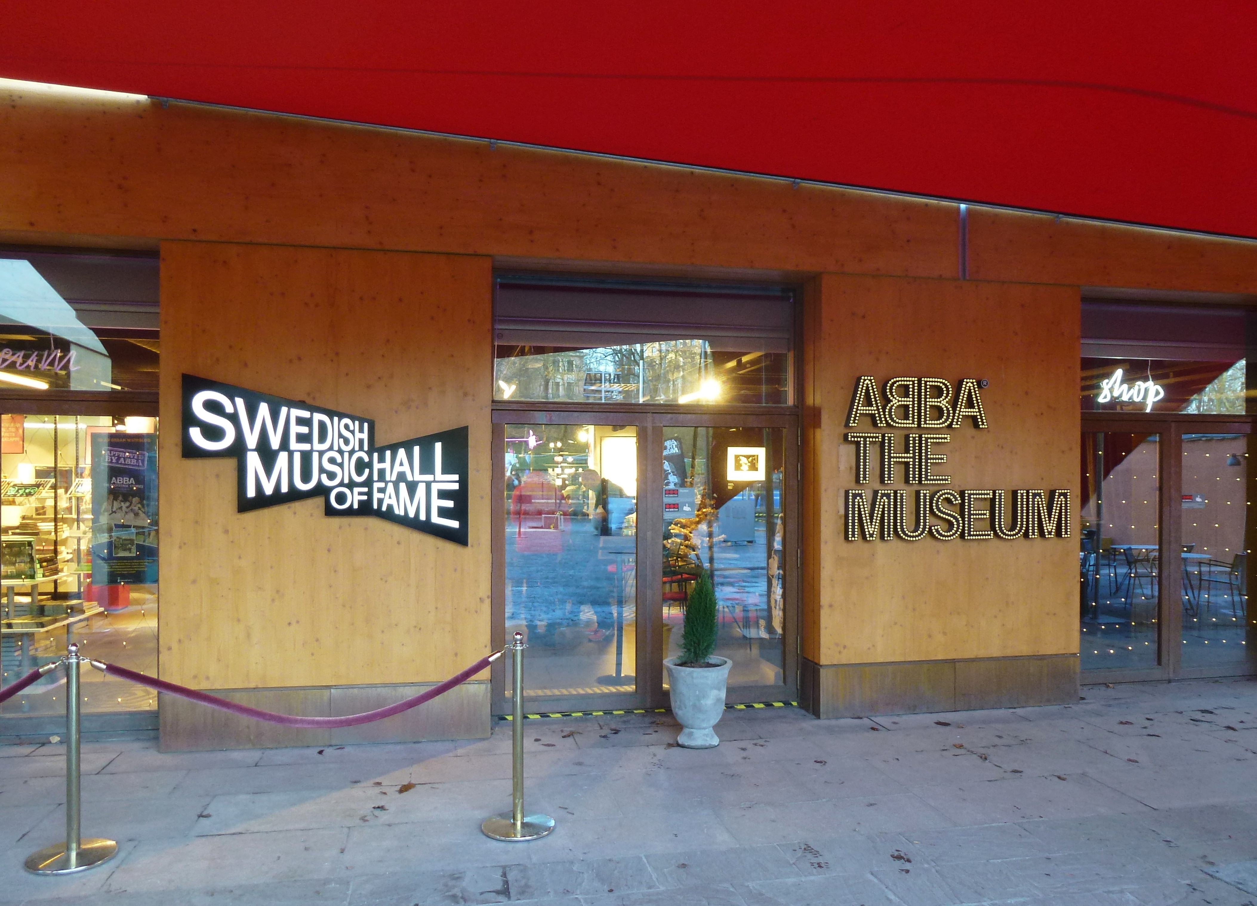 ABBA the Museum, entré